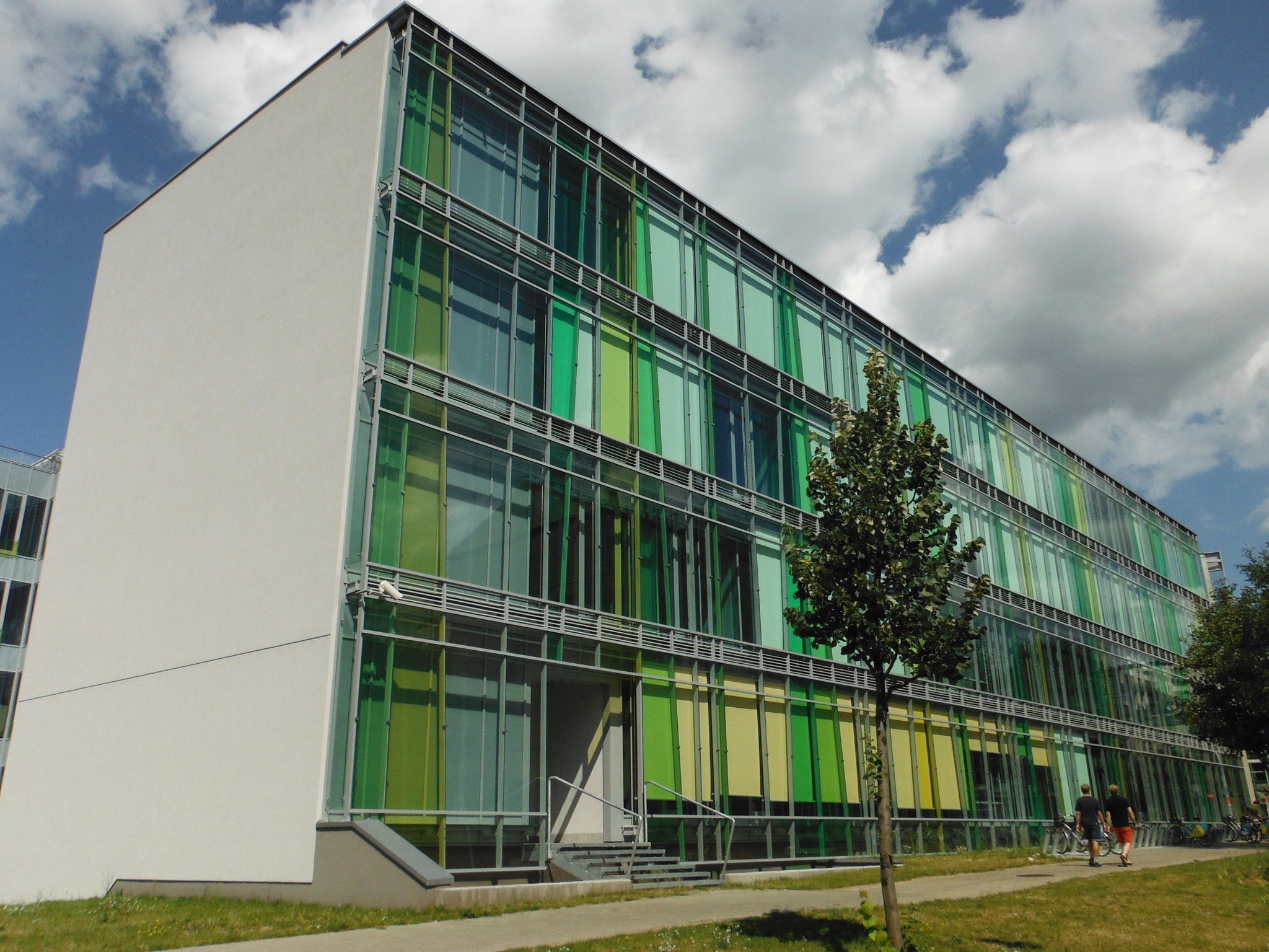 Gmach Wydziału Lingwistyki Stosowanej UW przy ul. Dobrej w Warszawie.